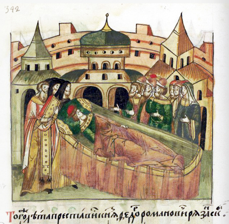 ЛИЦЕВОЙ ЛЕТОПИСНЫЙ СВОД В том же году преставился князь Федор Романович Рязанский.